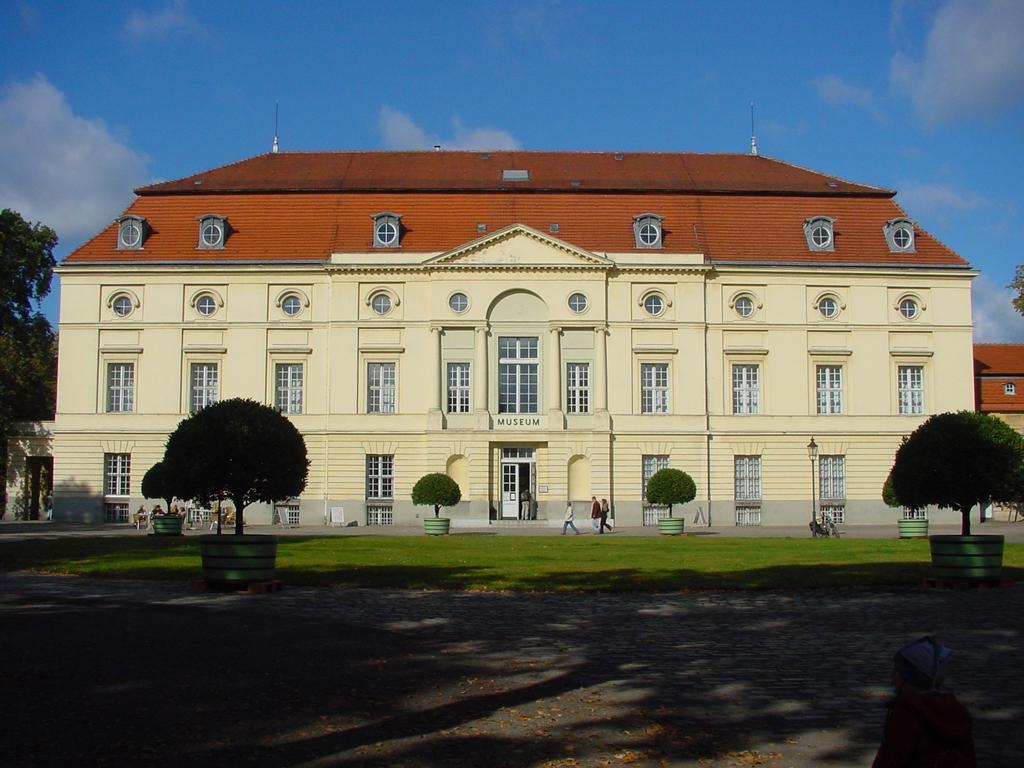 ehemaliges Schlosstheater (Langhansbau) Charlottenburg, Berlin, heute Museum für Vor- und Frühgeschichte der Staatlichen Museen zu Berlin